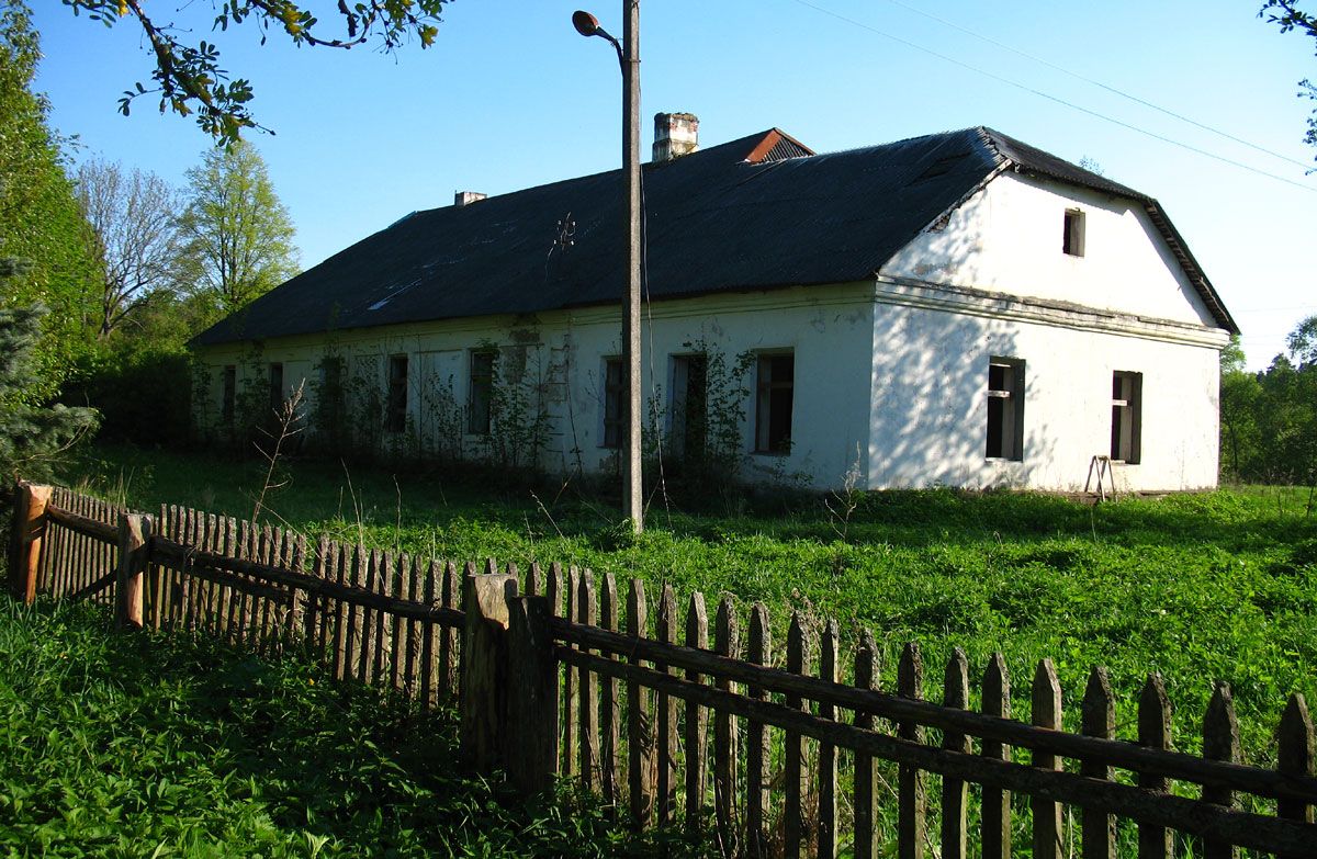 Беларуская (тарашкевіца): Лявонпаль